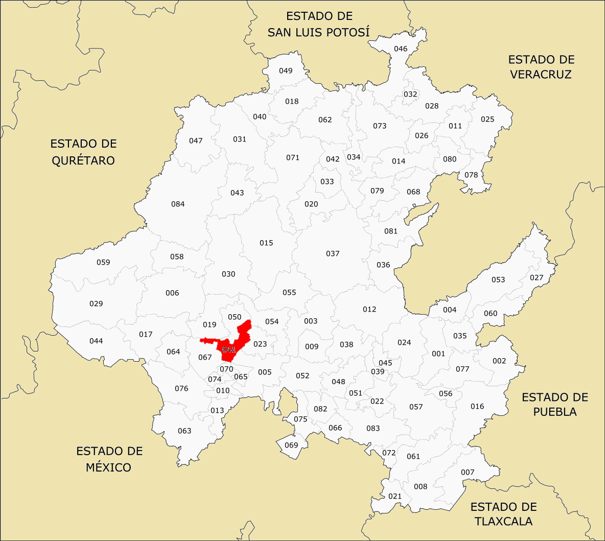 Municipio de Hidalgo